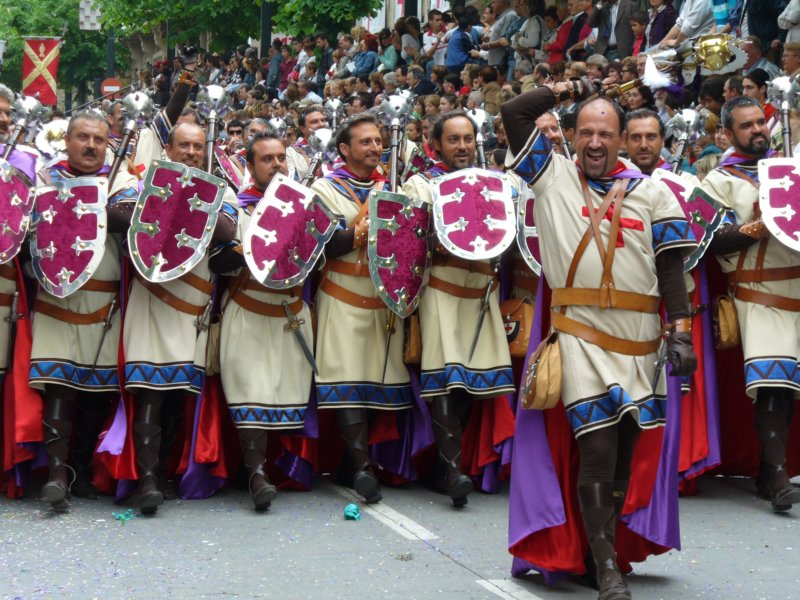 Entrada de Cristianos 2006